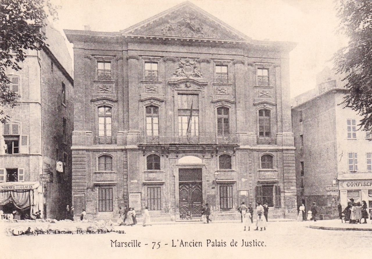 Marseille, ancien palais de justice. Carte postale ancienne, avant 1914.